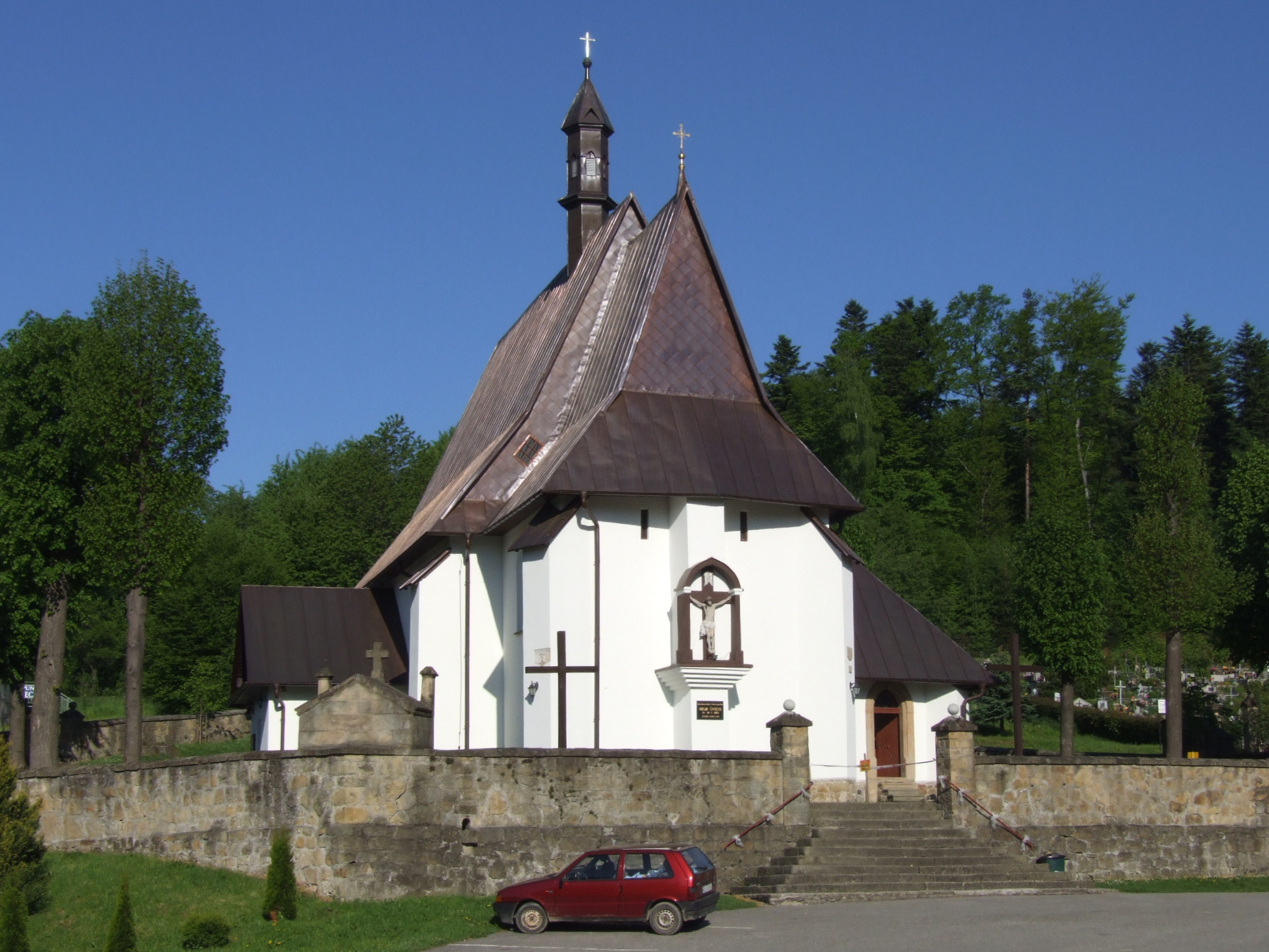 Kościół w Nowym Rybiu